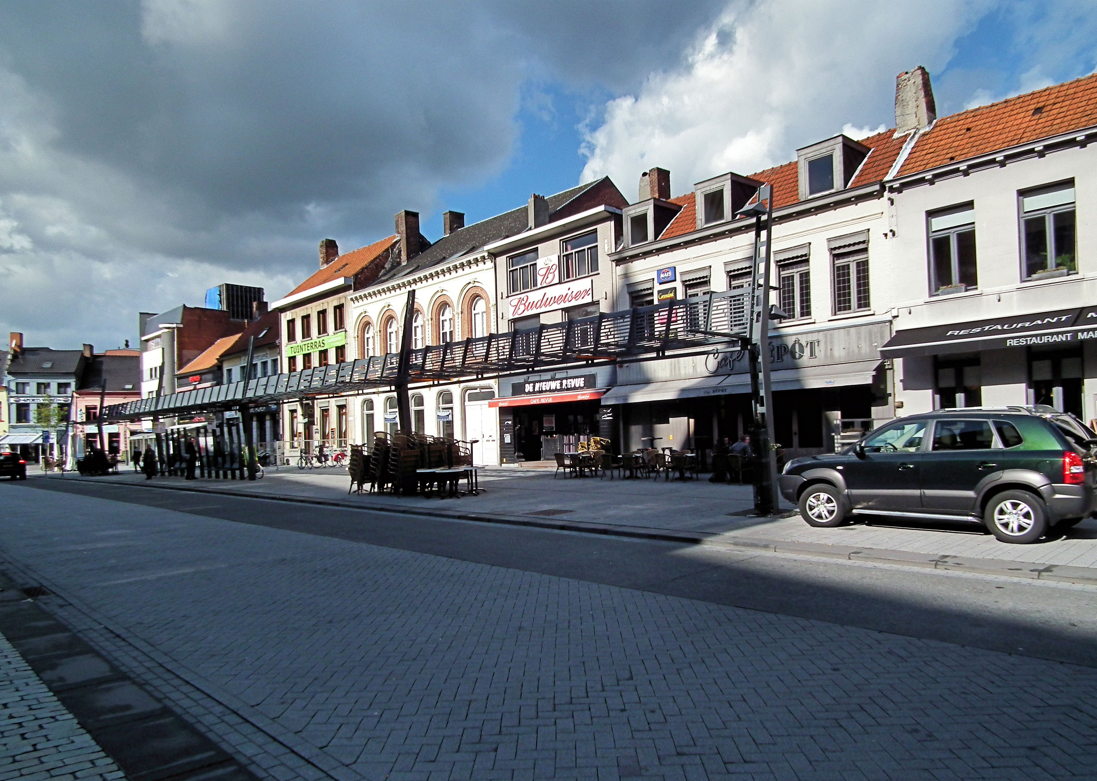 België - Turnhout. Rond de Grote Markt.